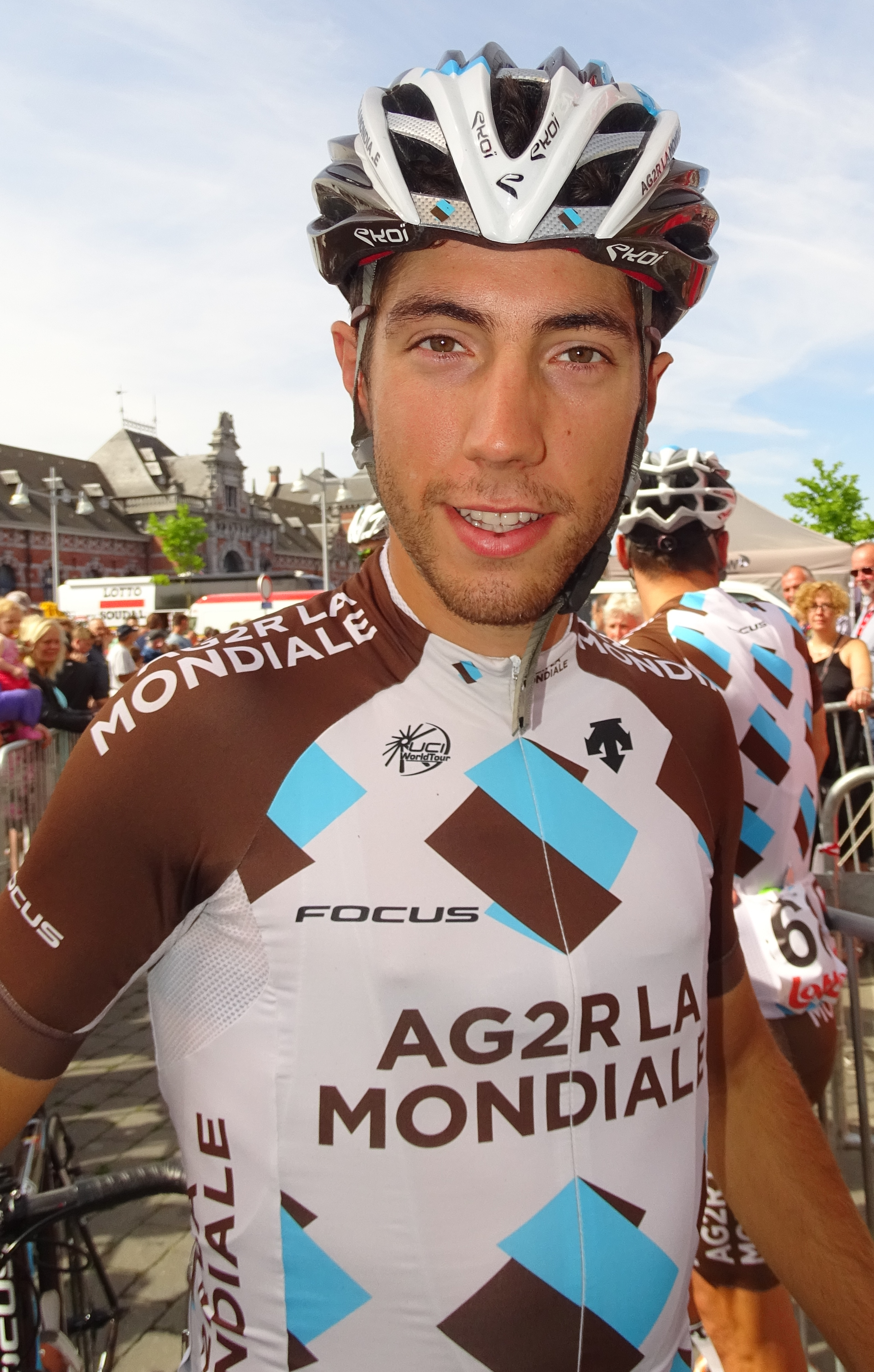 Reportage réalisé le mercredi 22 juillet à l'occasion du départ du Grand Prix Pino Cerami 2015 à Saint-Ghislain, Belgique.